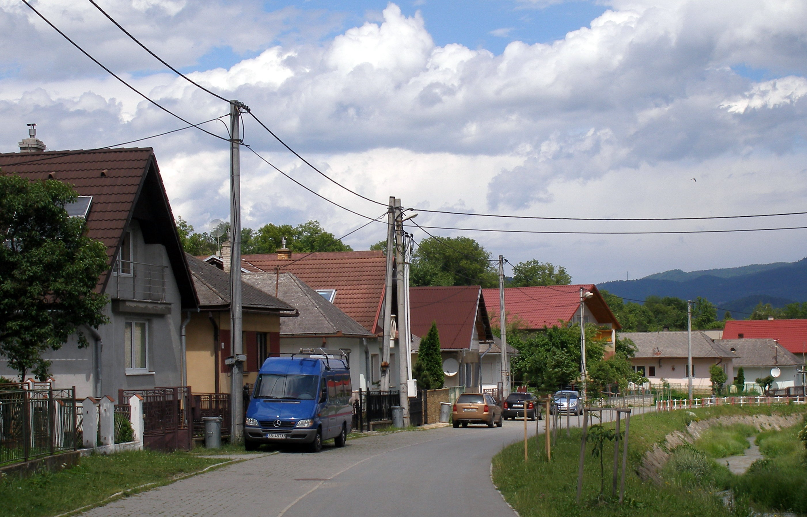 Obec Dubovica okres Sabinov